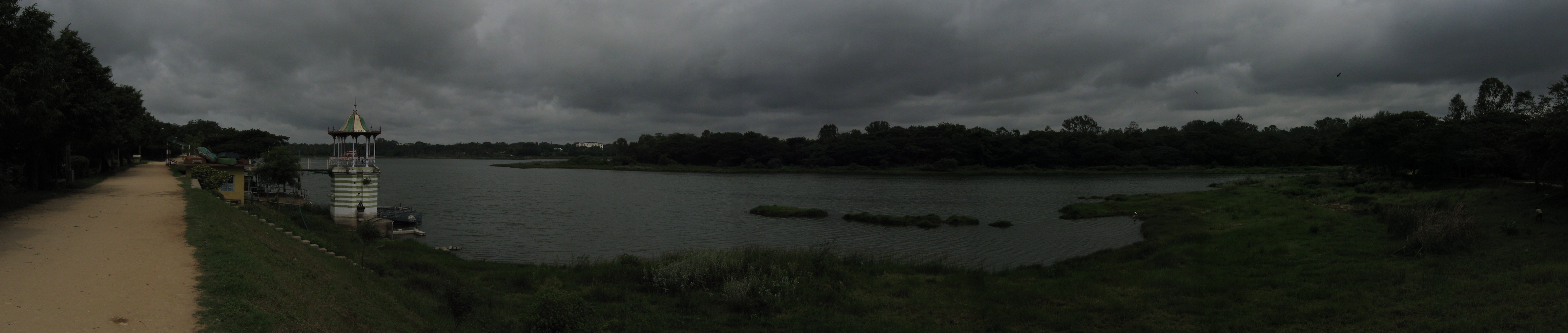 Kukkarahalli kere Mysore